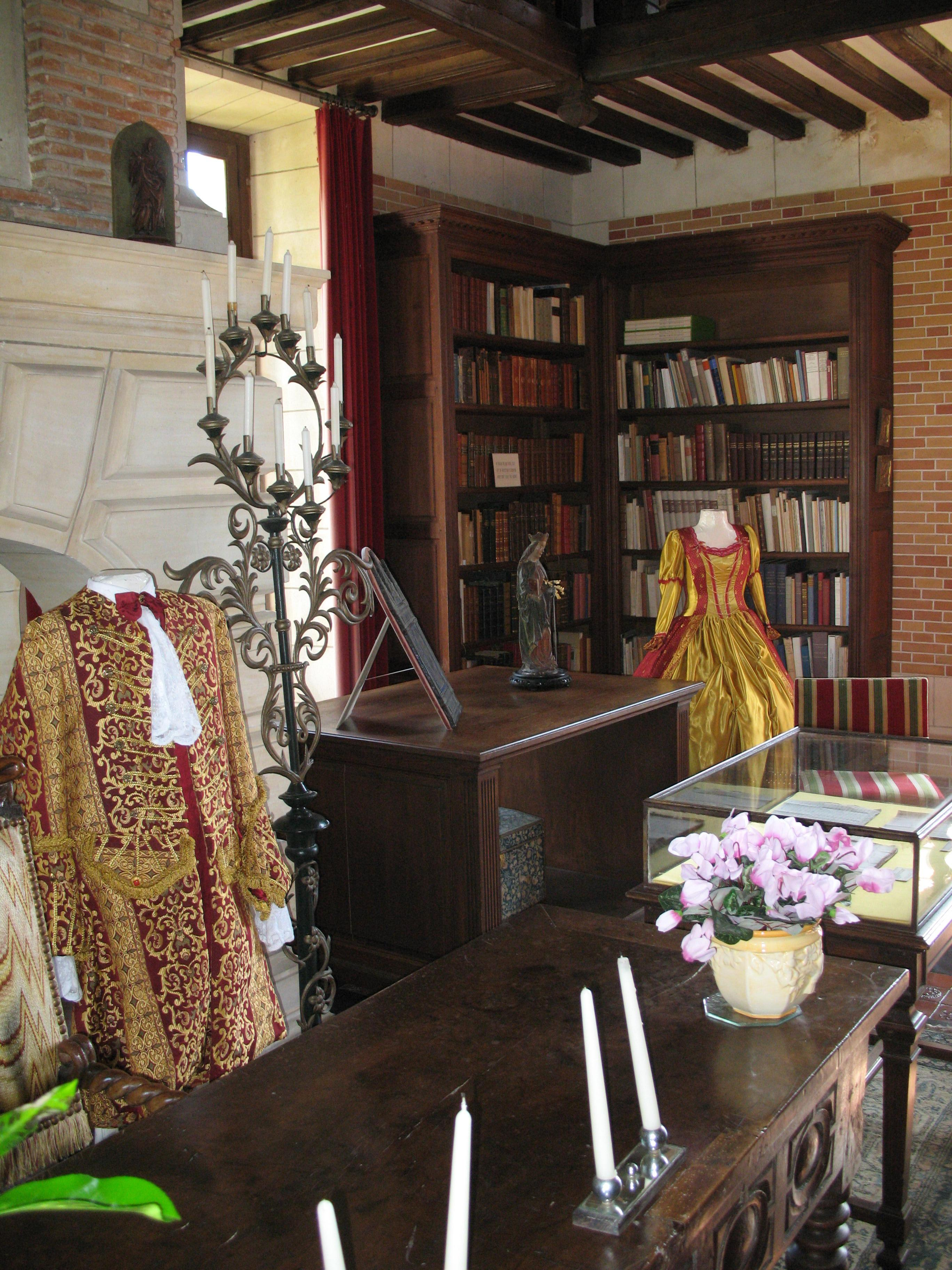 Château de Beaumesnil, à Beaumesnil dans l'Eure